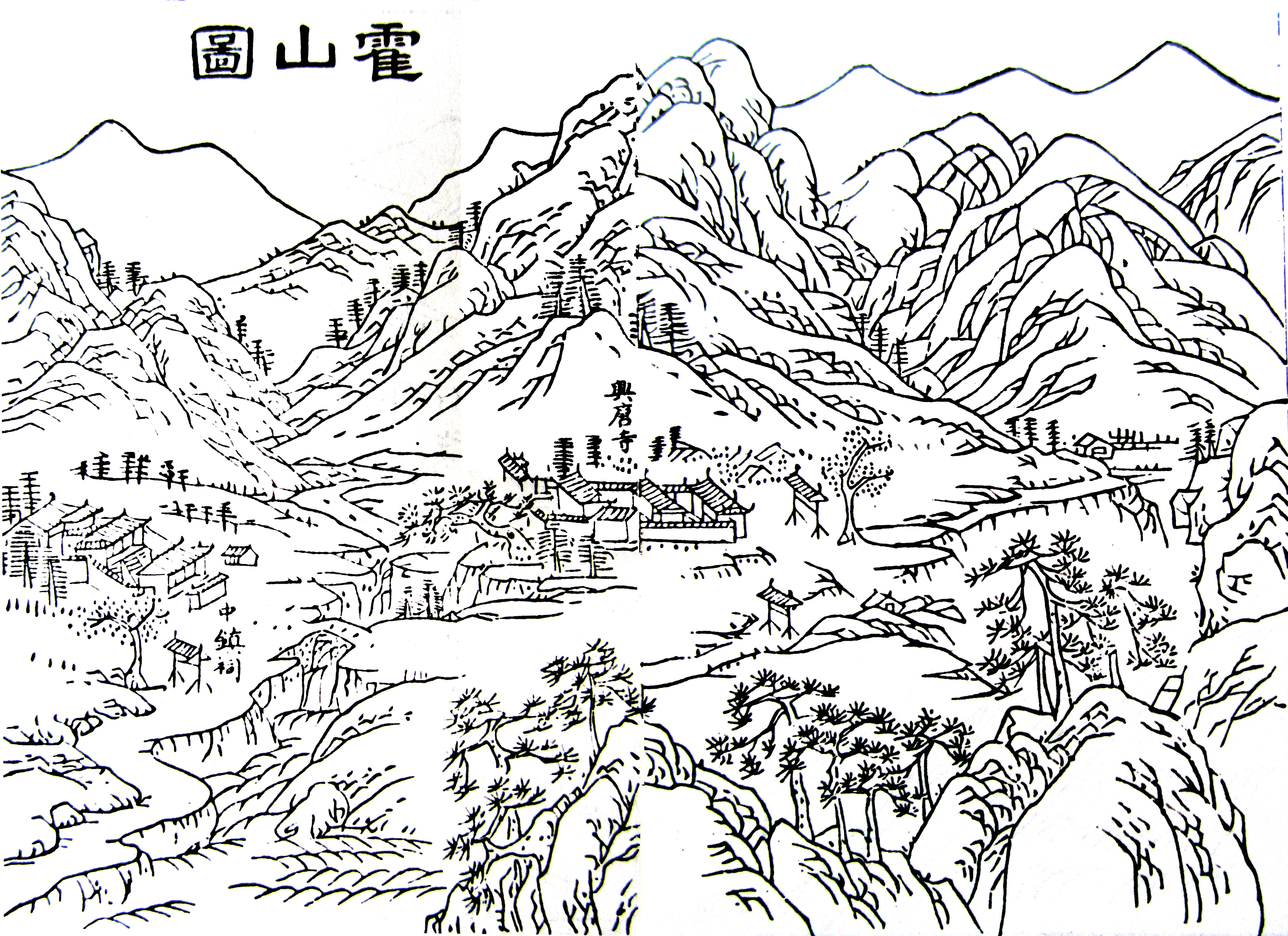 清代道光五年（1825年）《直隶霍州志》所载中镇庙图。